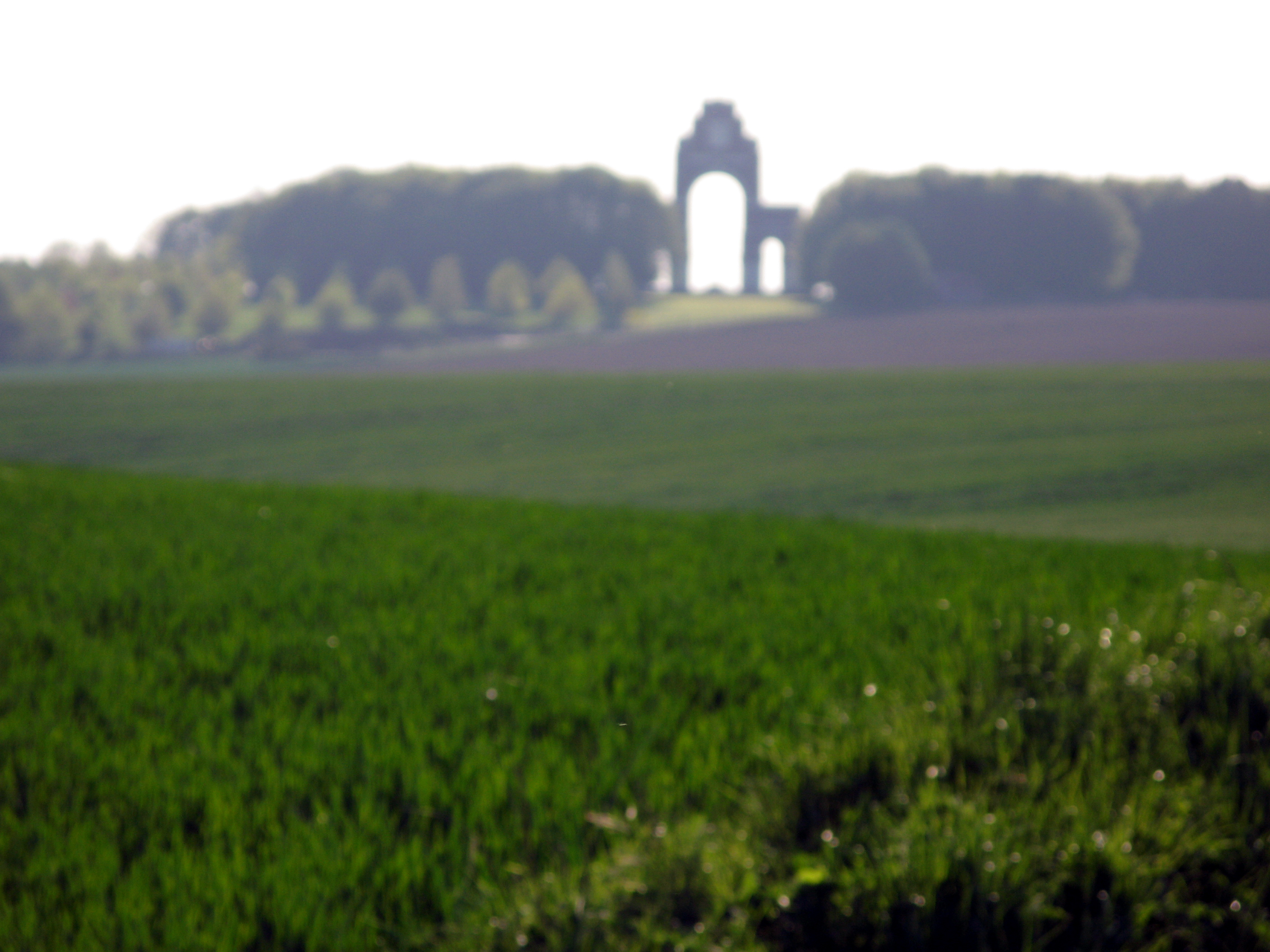 Thiepval (Somme, France) Le Mémorial aperçu depuis les environs de la Ferme du Mouquet. (La photo est floue, pour tenter de rendre une impression de mystère.)